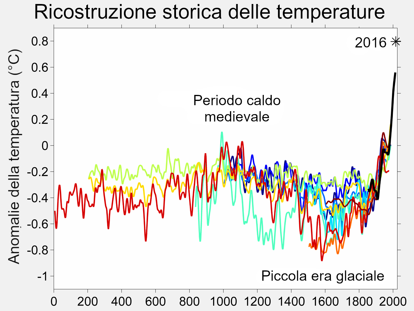 Ricostruzione storica dell'andamento delle temperature.